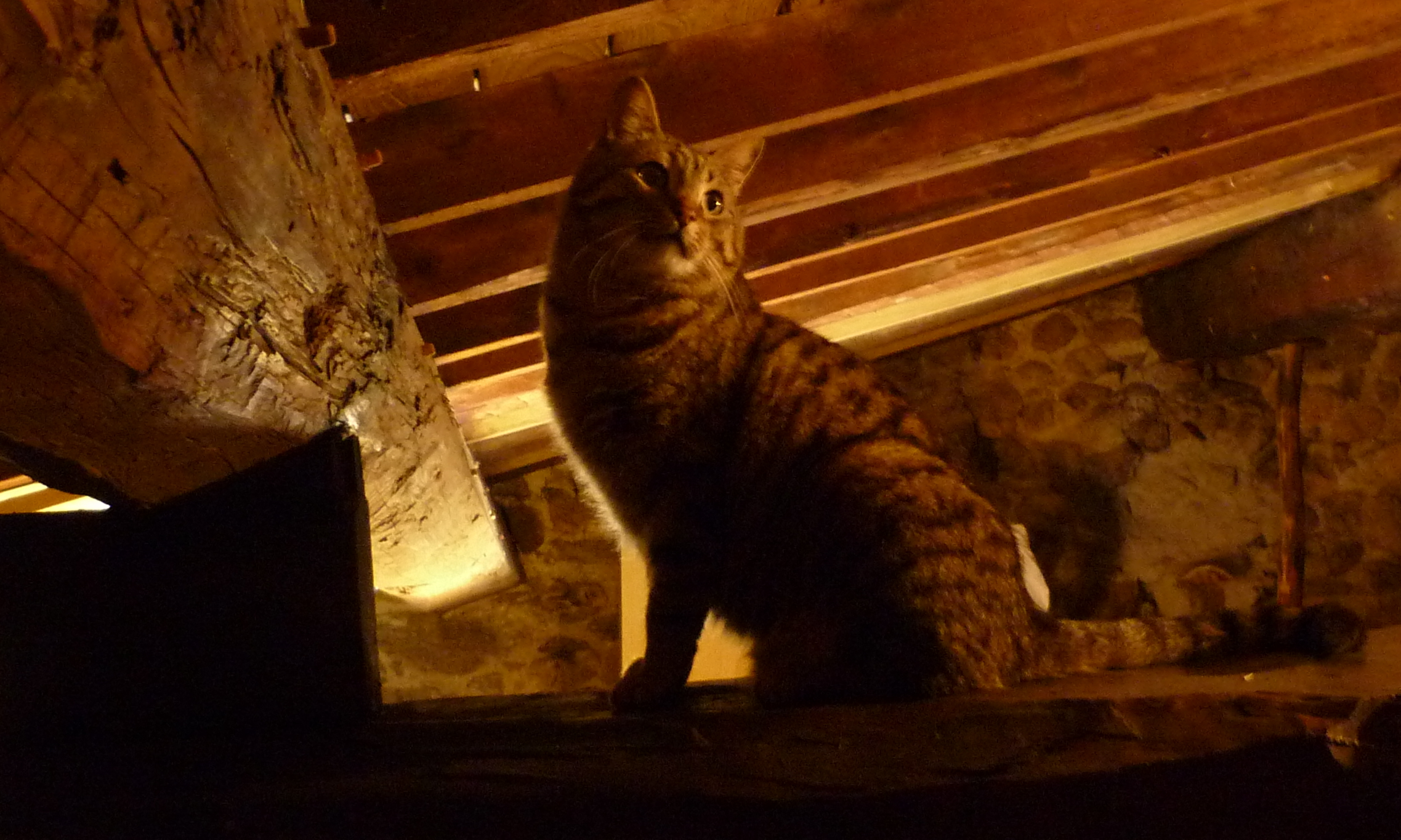 Felis silvestris catus, chat de gouttière, France